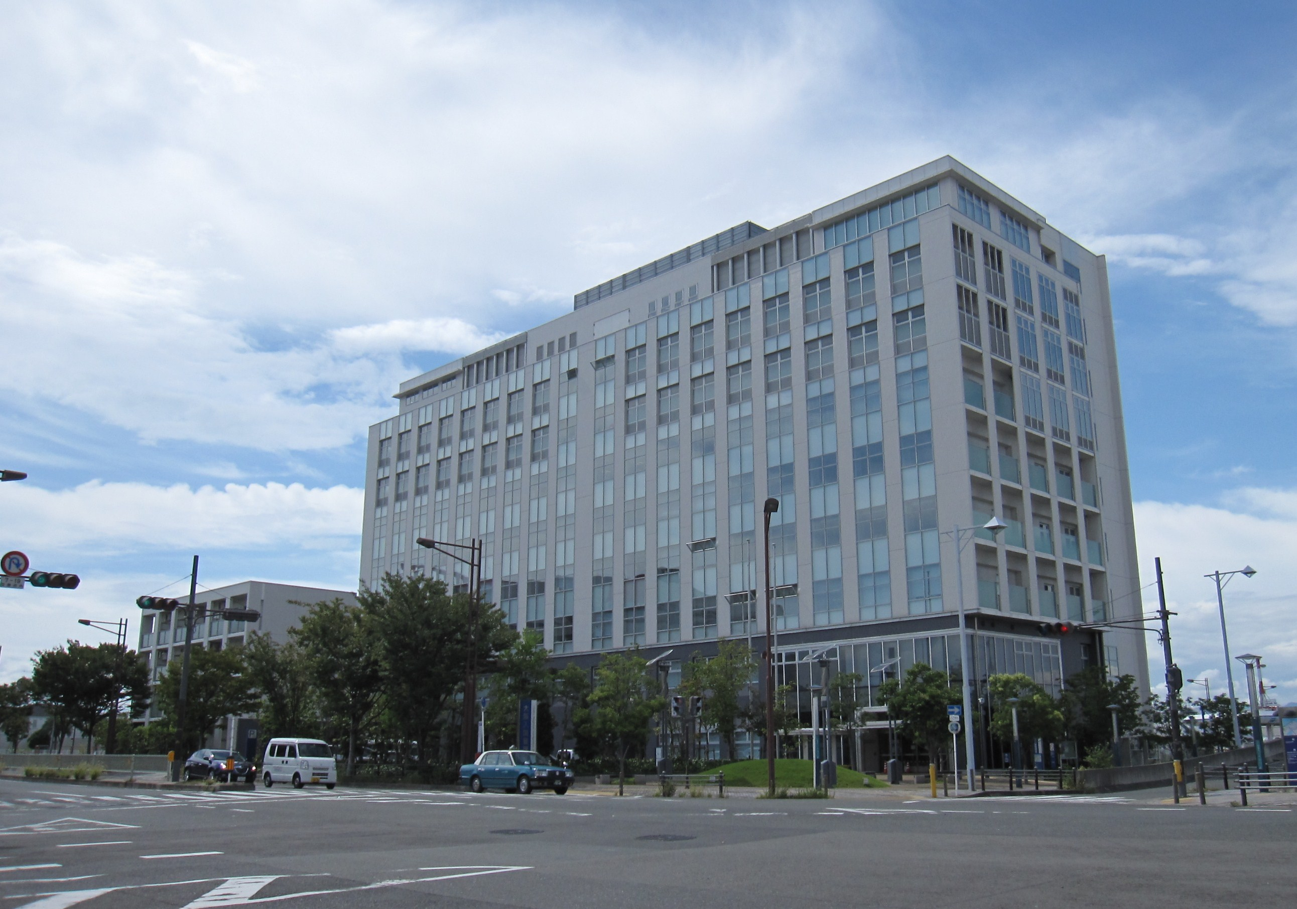 大阪入国管理局